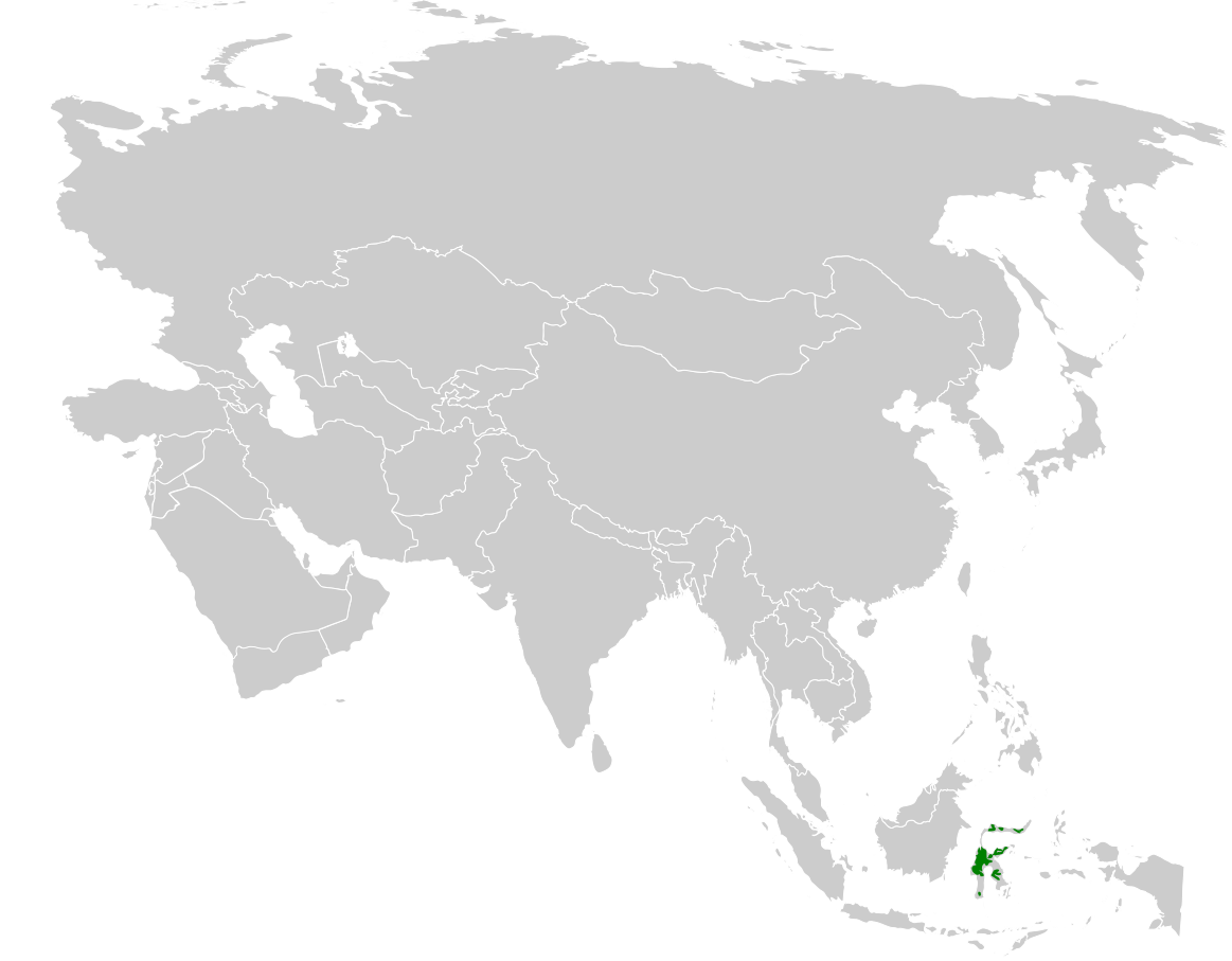 Mali grata distribution map, based on